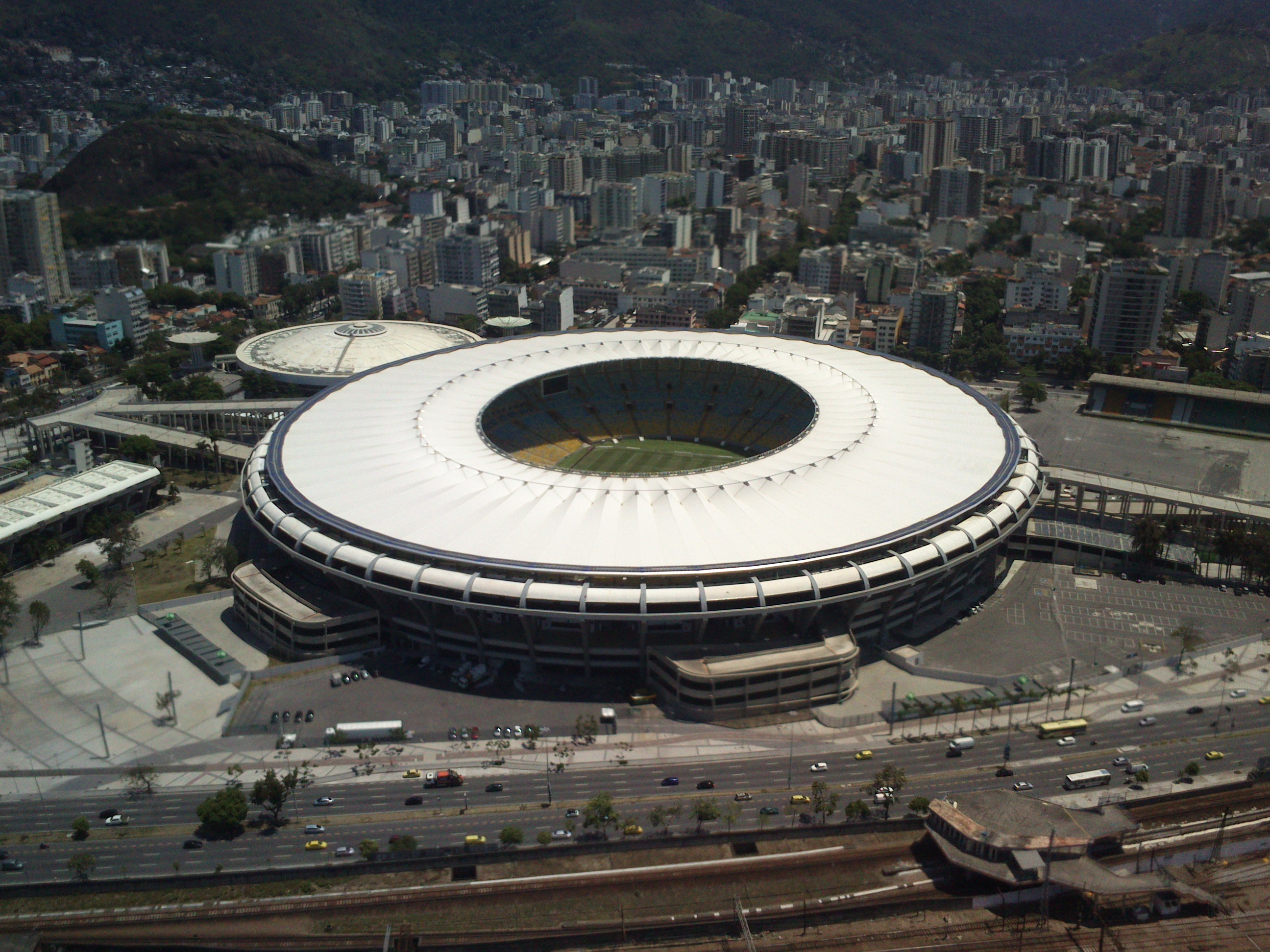 Visão Aérea do Estádio Mário Filho, conhecido como Estádio Maracanã